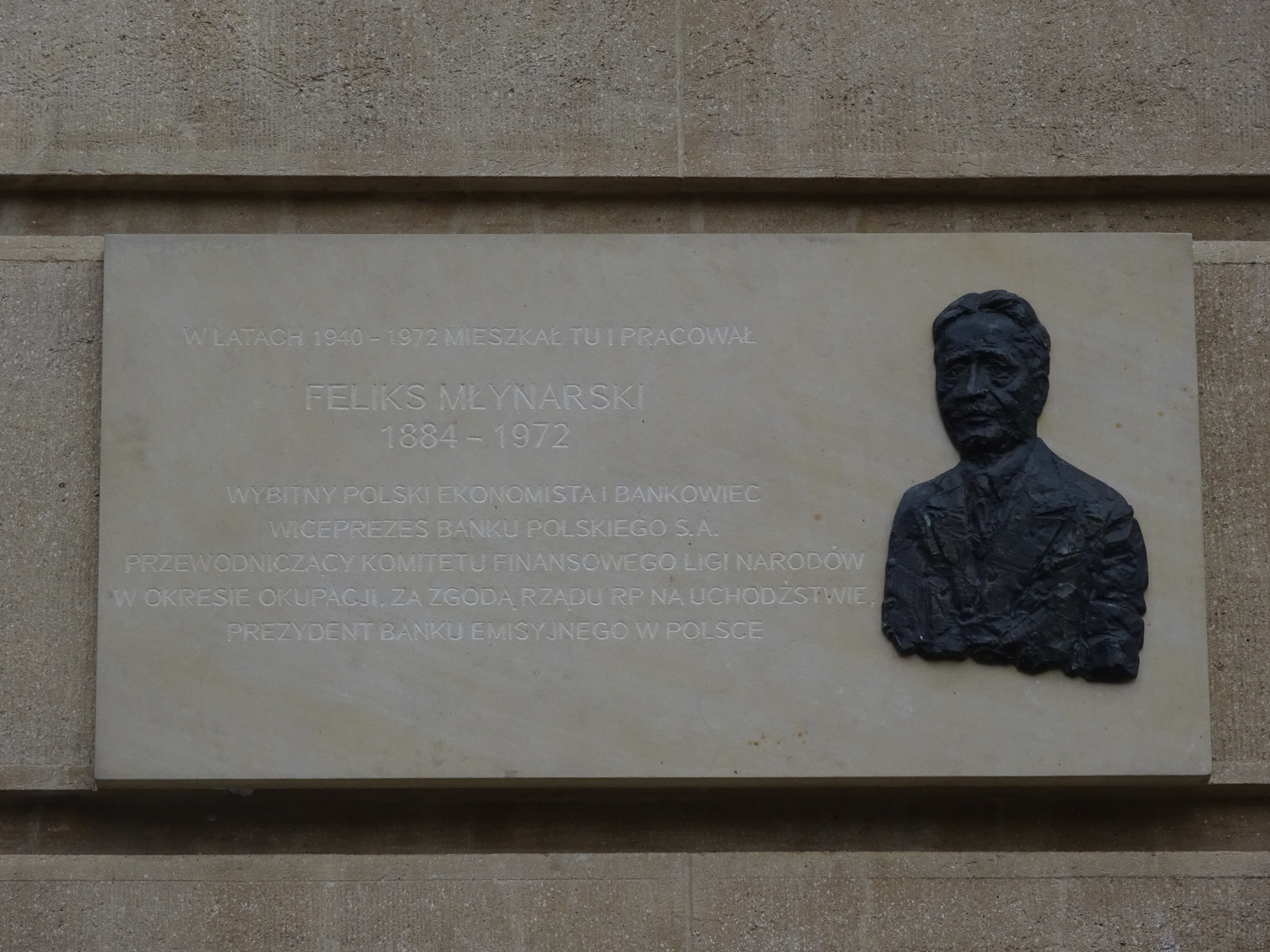 Tablica upamiętniająca Feliksa Młynarskiego (iż tu mieszkał i pracował) na elewacji gmachu Narodowego Banku Polskiego przy ulicy Basztowej 20 w Krakowie.